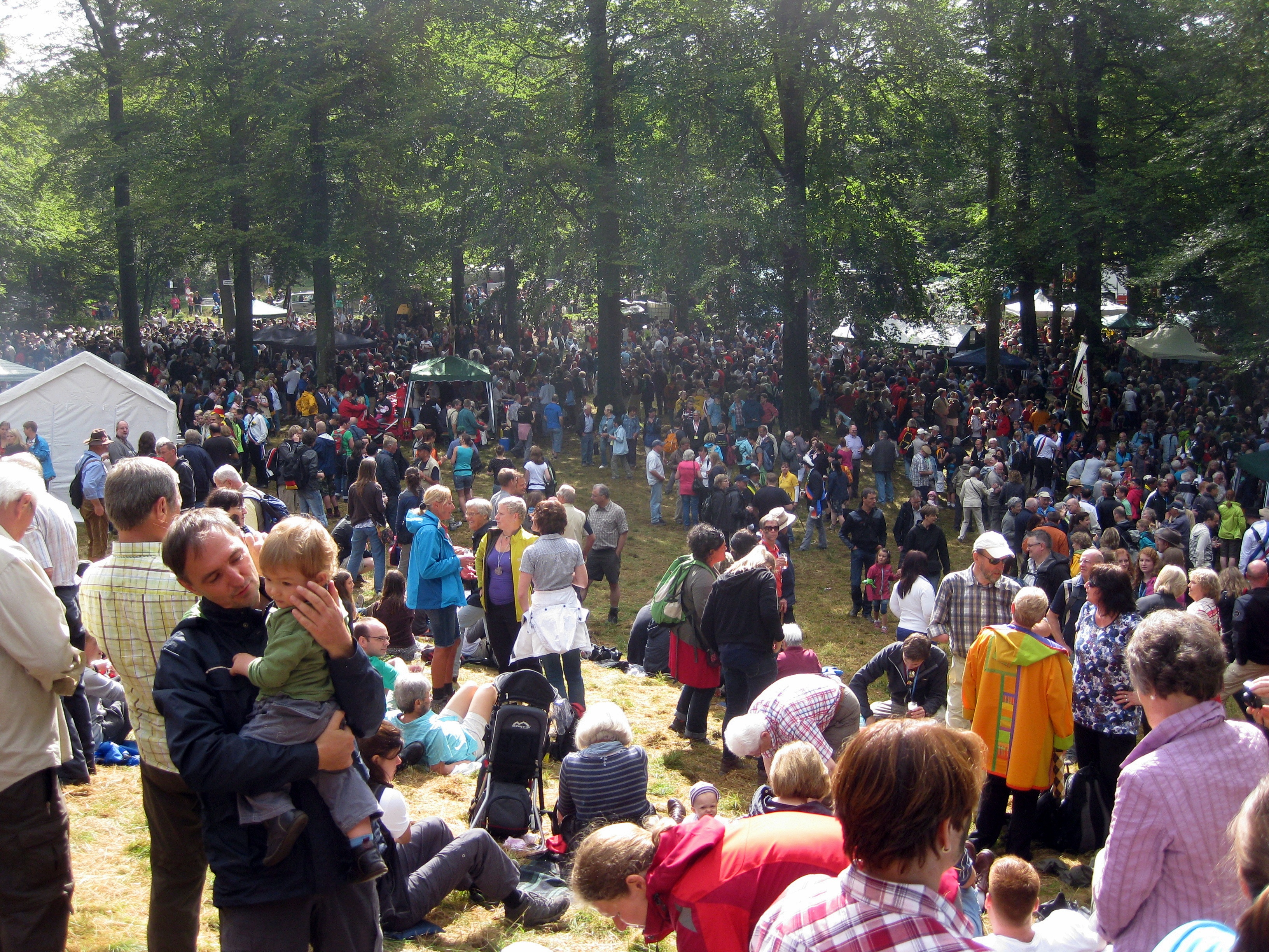 Deutschland, Biedenkopf: Grenzgang; historisches Heimatfest. Munteres Treiben am Frühstücksplatz des 1.Tages auf dem Biedenkopfer Hausberg, der "Sackpfeife" mit vielen Grenzgängern, deren Gesellschaftsfahnen sowie weiteren Gästen und Besuchern.